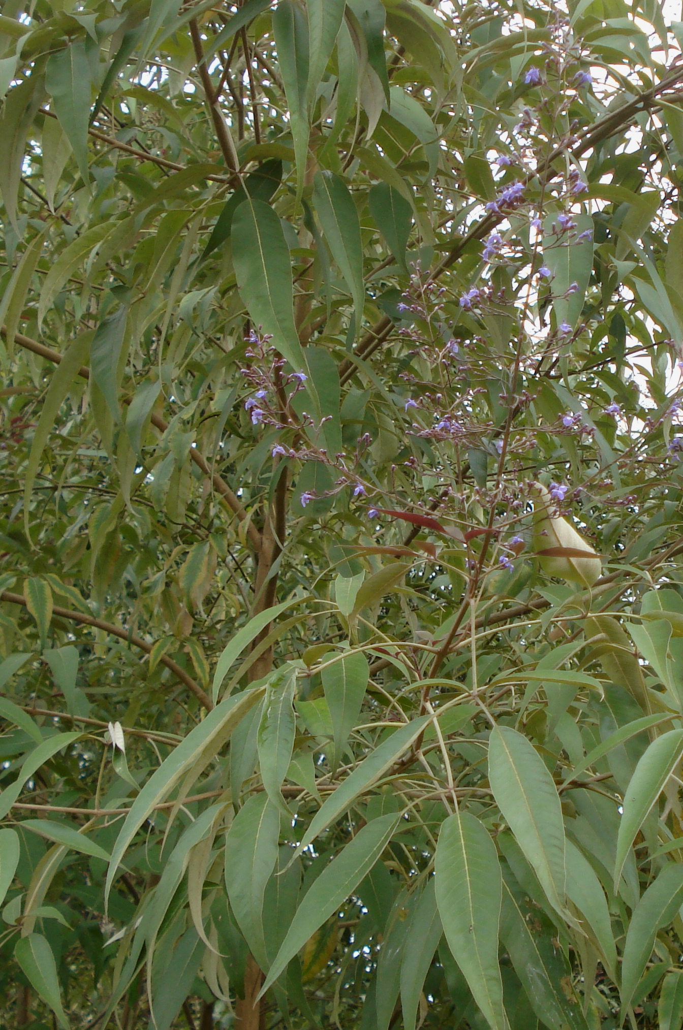 ഒരു ഔഷധ സസ്യമായ കരിനൊച്ചി